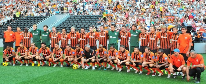 Шахтар Донецьк сезону 2011/2012